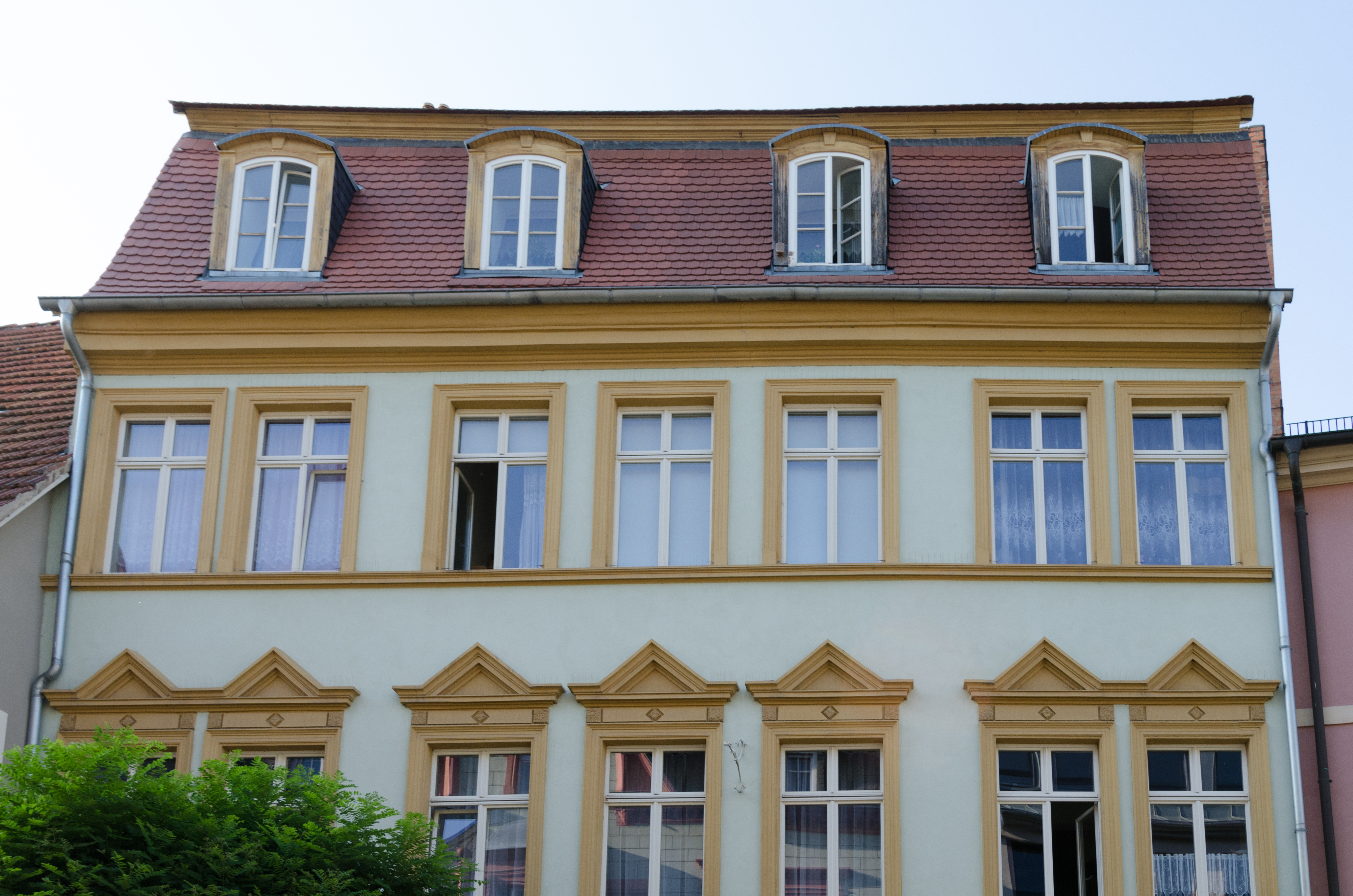 Naumburg, Salzstraße 10